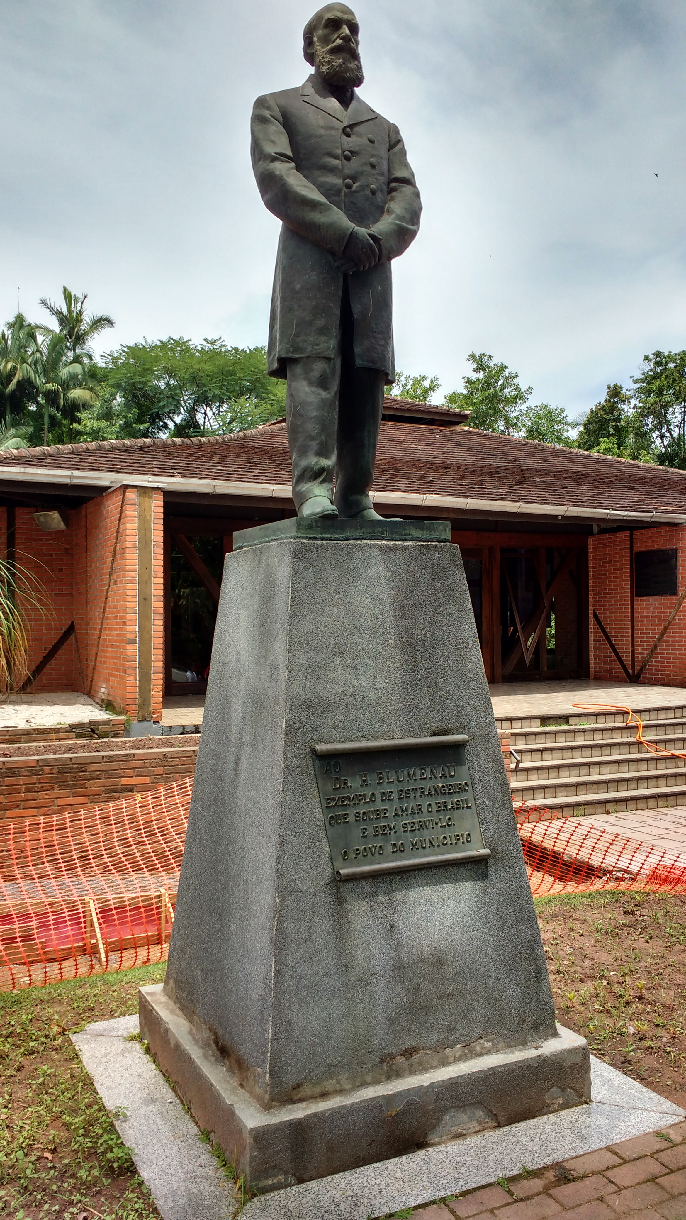 Estátua de Hermann Blumenau em frente ao Mausoleu Doutor Blumenau, em Blumenau, em Santa Catarina.